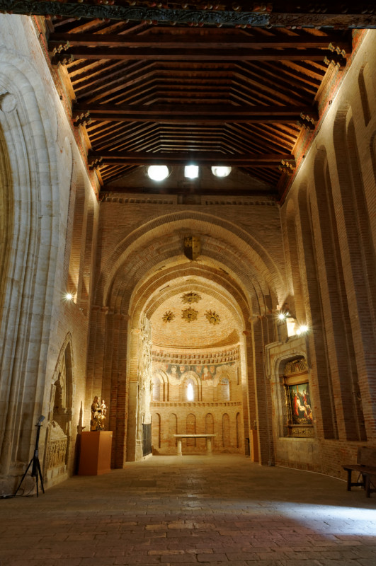 Iglesia de San Lorenzo el Real de Toro (Zamora)